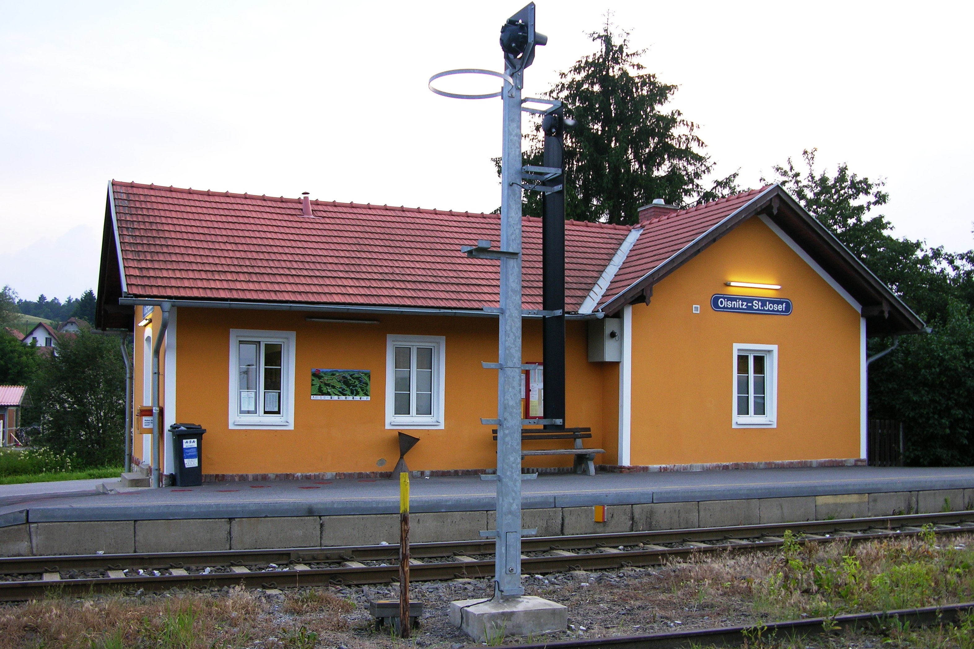 Bahnhof Oisnitz-St.Josef in der Weststeiermark